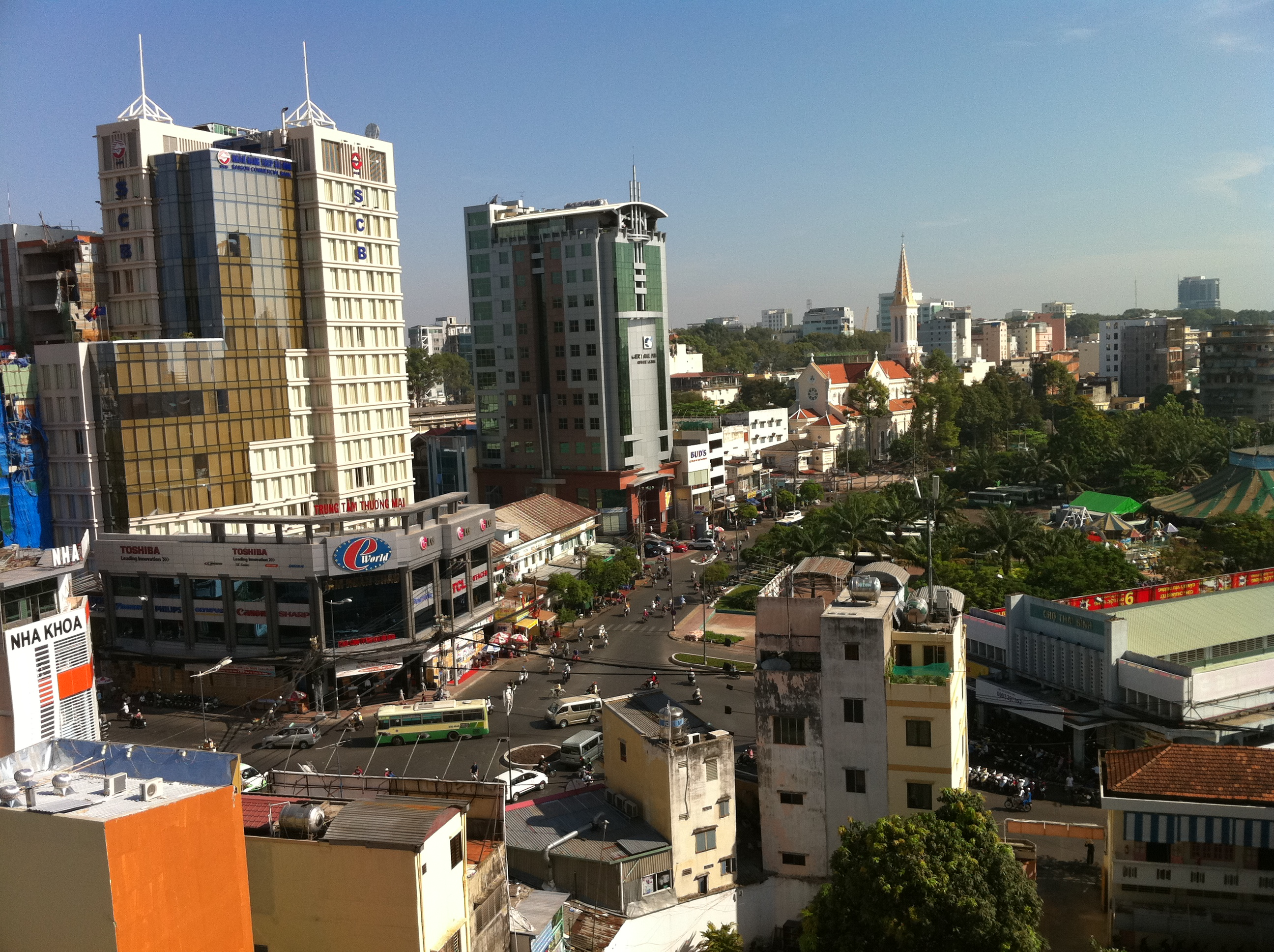 nga sau Pham ngu lao va nguyen trai , saigon , viet nam